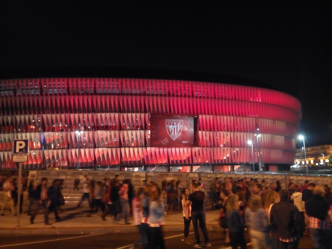 Final Copa del Rey 2015